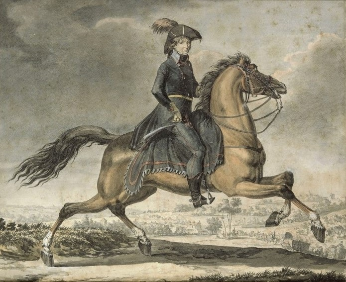 Le général Jean-Baptiste Bernadotte (1767-1844), à cheval pendant la première campagne d'Italie.